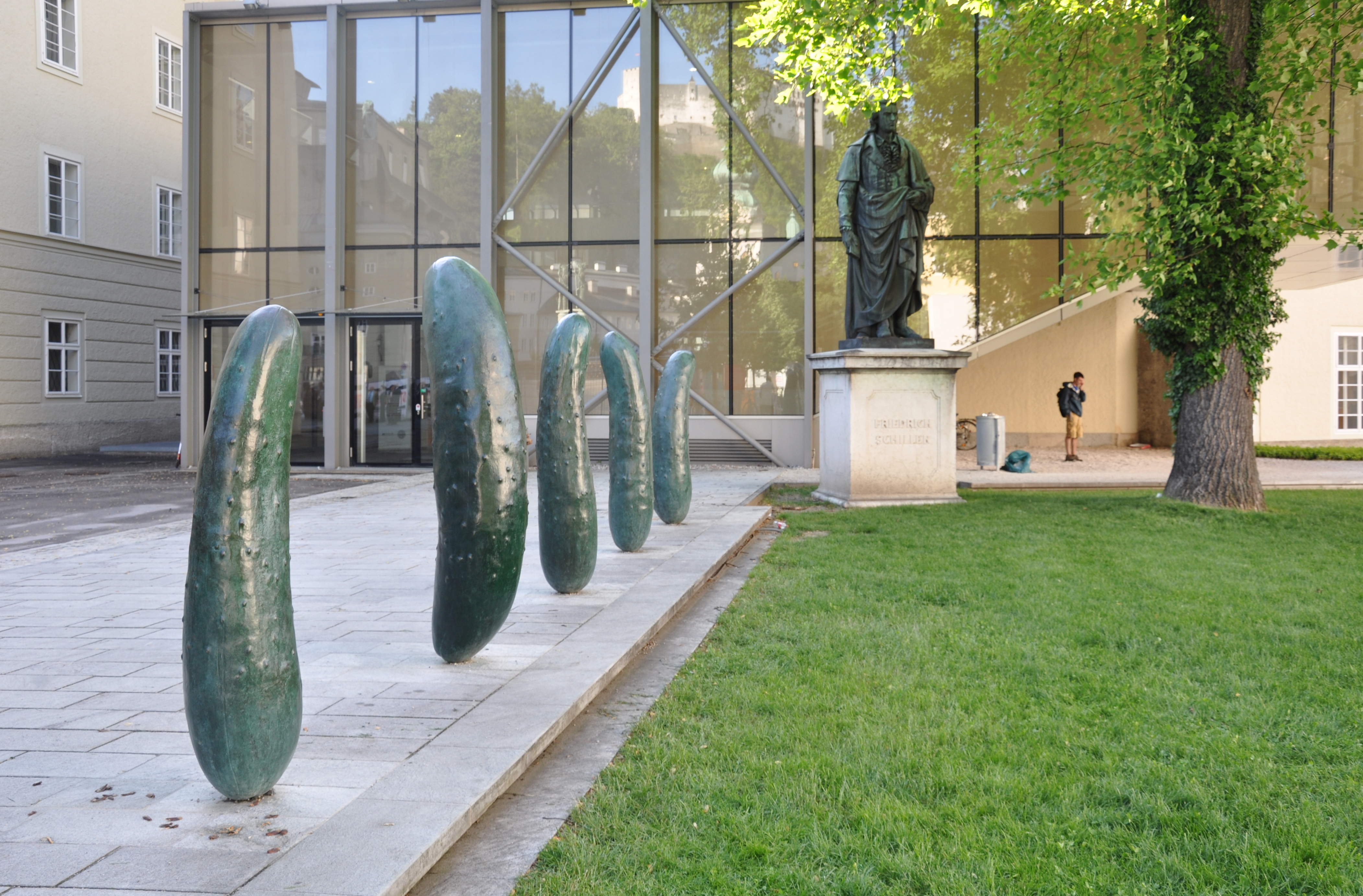 Salzburg, Furtwänglerpark, Skulpturengruppe "Gurken" von Erwin Wurm